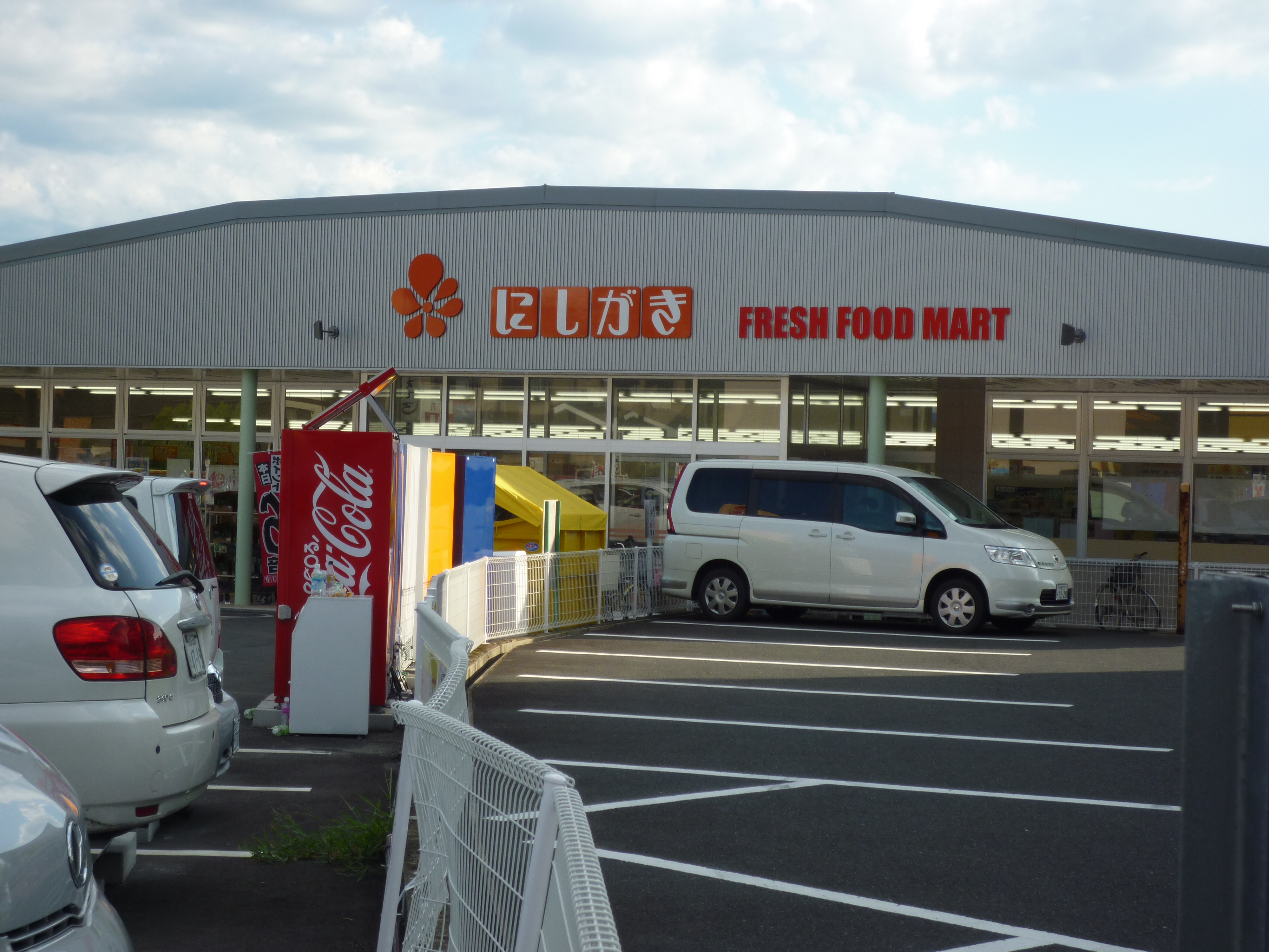 スーパーにしがき府中店